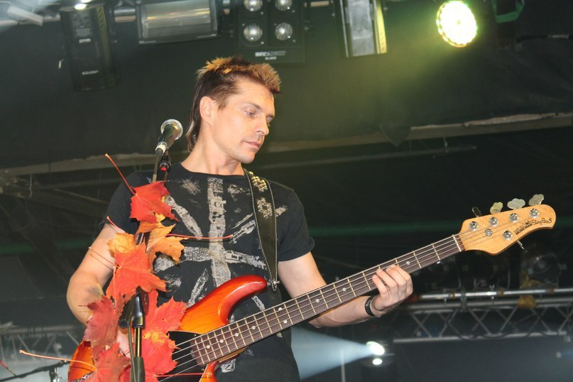 Стас Марков